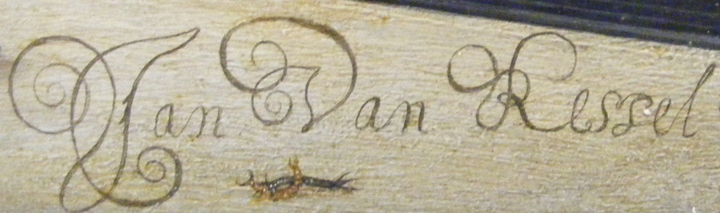 Autograph of Jan van Kessel on his painting "Der Erdteil Amerika" (Alte Pinakothek Room 16, ground floor)